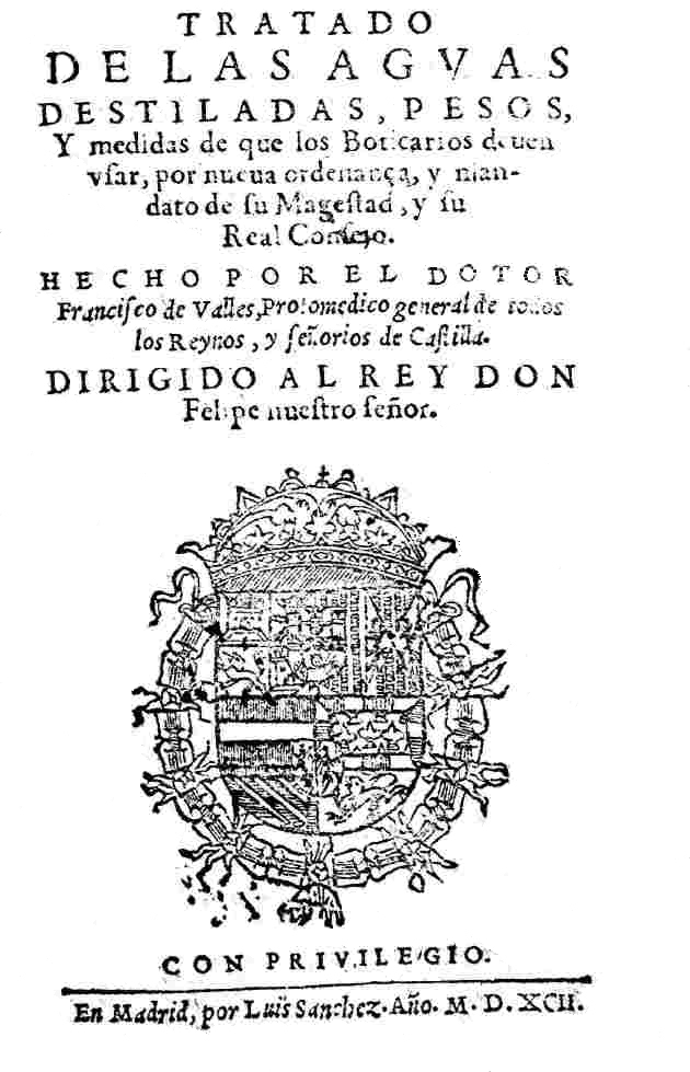 Portada el libro Tratado de las aguas destiladas, pesos, y medidas de que los boticarios deuen usar de Francisco Vallés. Publicado en Madrid en 1592.